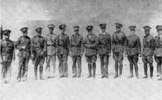 Directorio Militar se alza en armas. Tras una fuerte batalla en diferentes puntos de San Salvador, derroca y manda al exilio al presidente de la república, el laborista Ing. Arturo Araujo